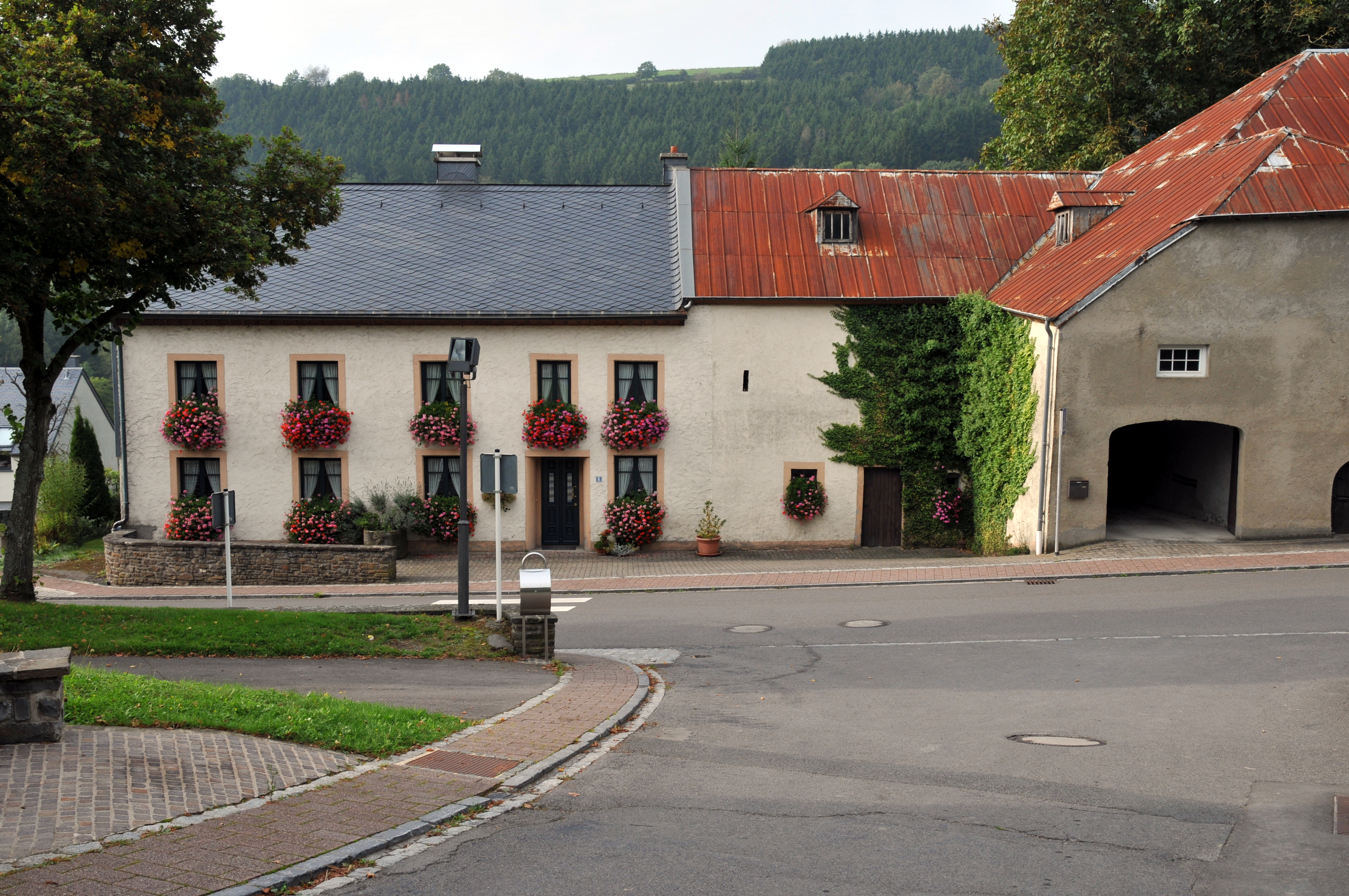 Haaptstroos Nr 5 zu Lëppschent.